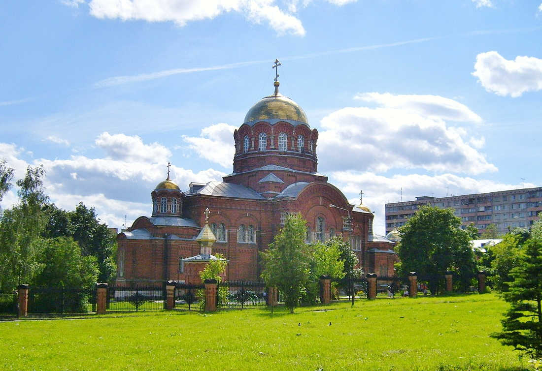 Храм Сергия Радонежского (Тула).jpg